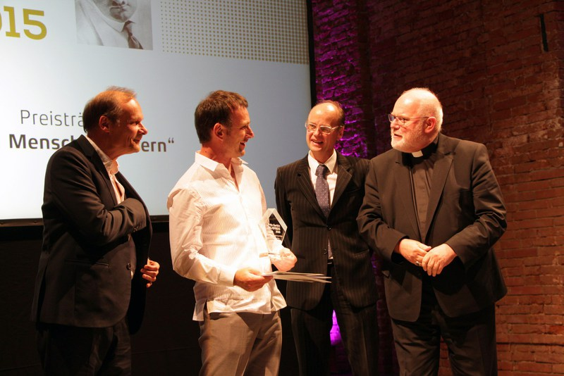 Verleihung des Fritz-Gerlich-Filmpreises 2015, mit (von links nach rechts) Kardinal Reinhard Marx, Martin Choroba, David Oelhoffen